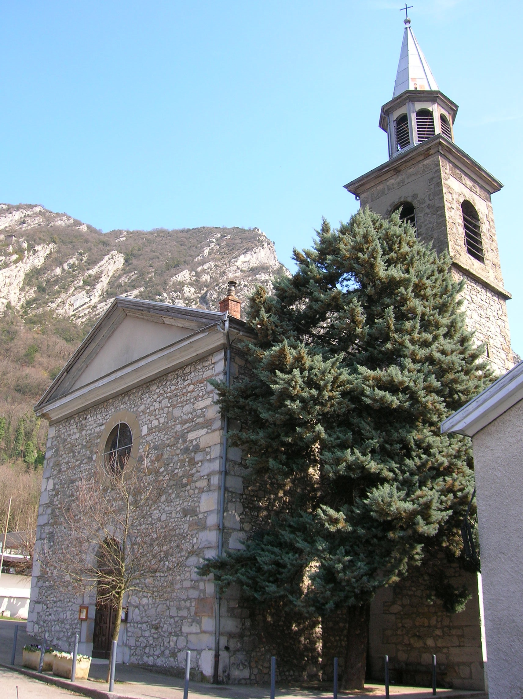 Saint-Martin-le-Vinoux, Isère, France. L'église.